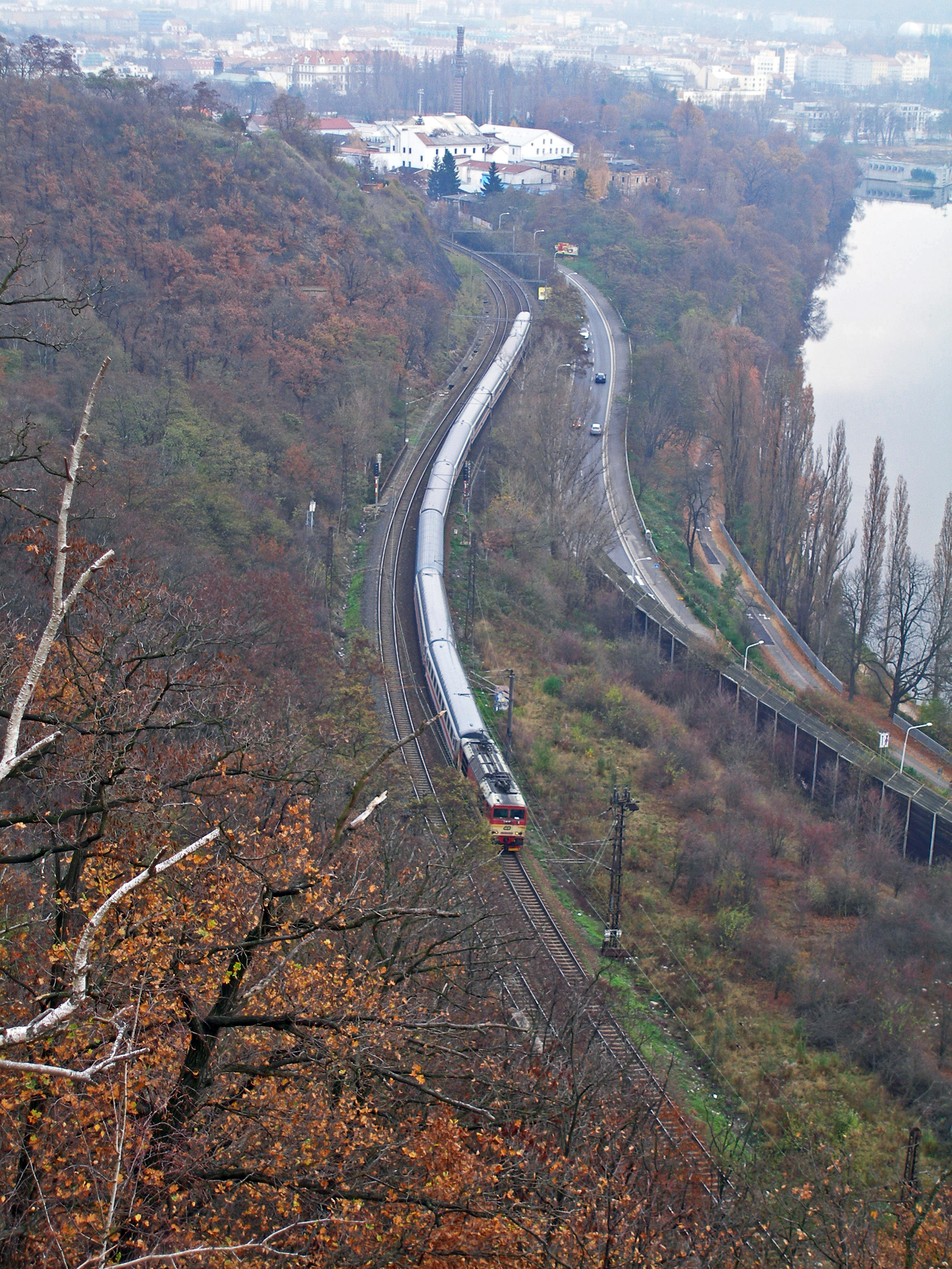 Vlak jedoucí do tunela pod Bílou skálou v Praze